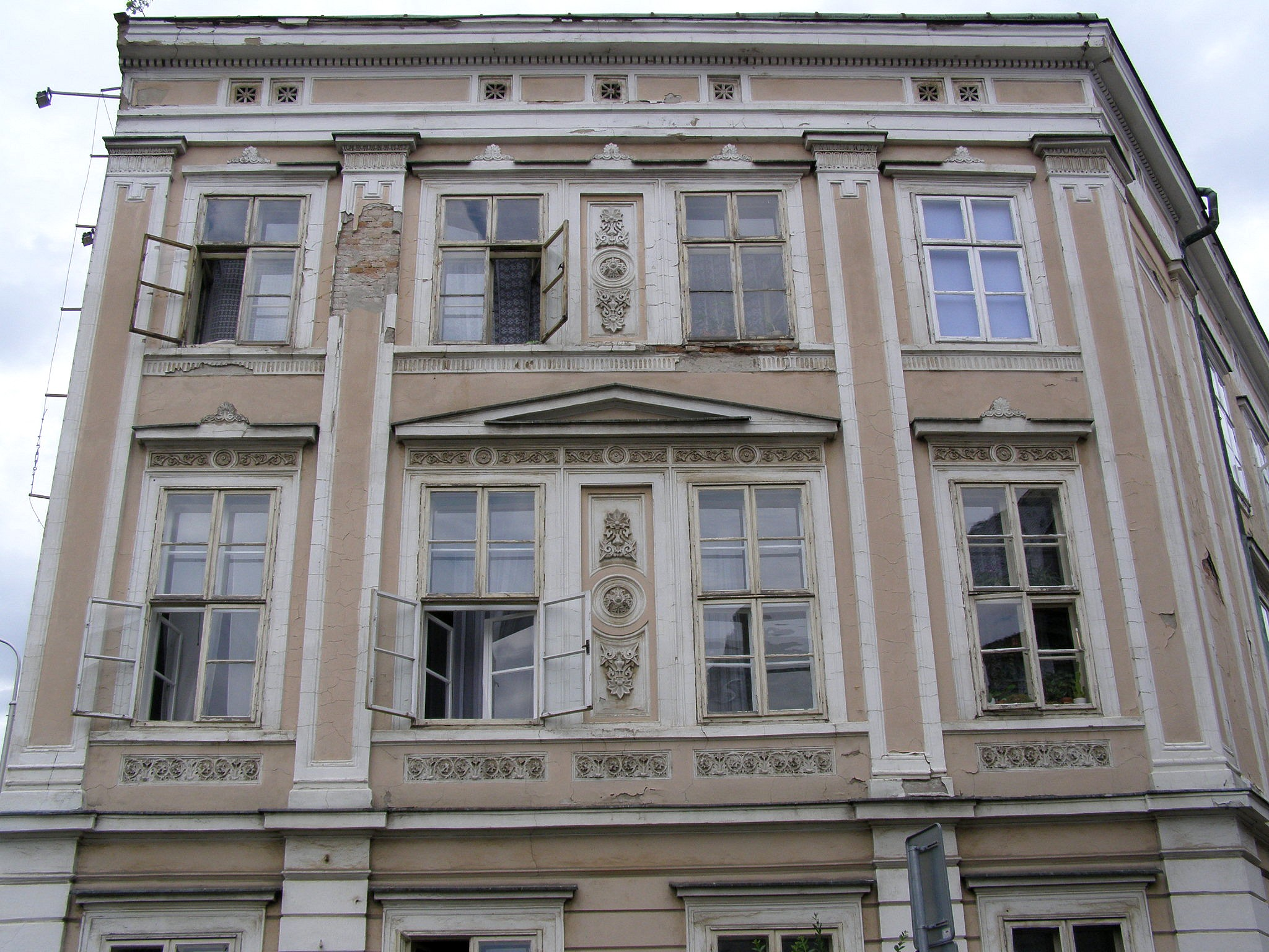 Konventná ul. č. 14. Bočné priečelie